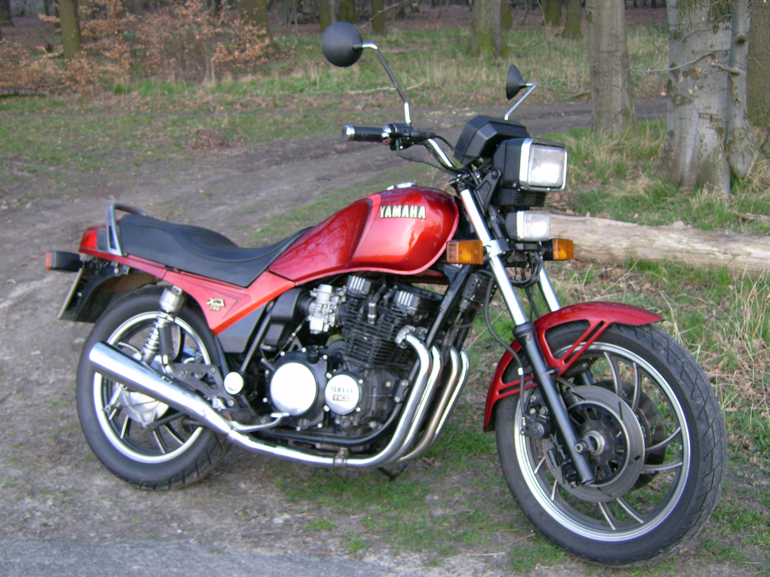 Yamaha XJ 750 Seca 11 M